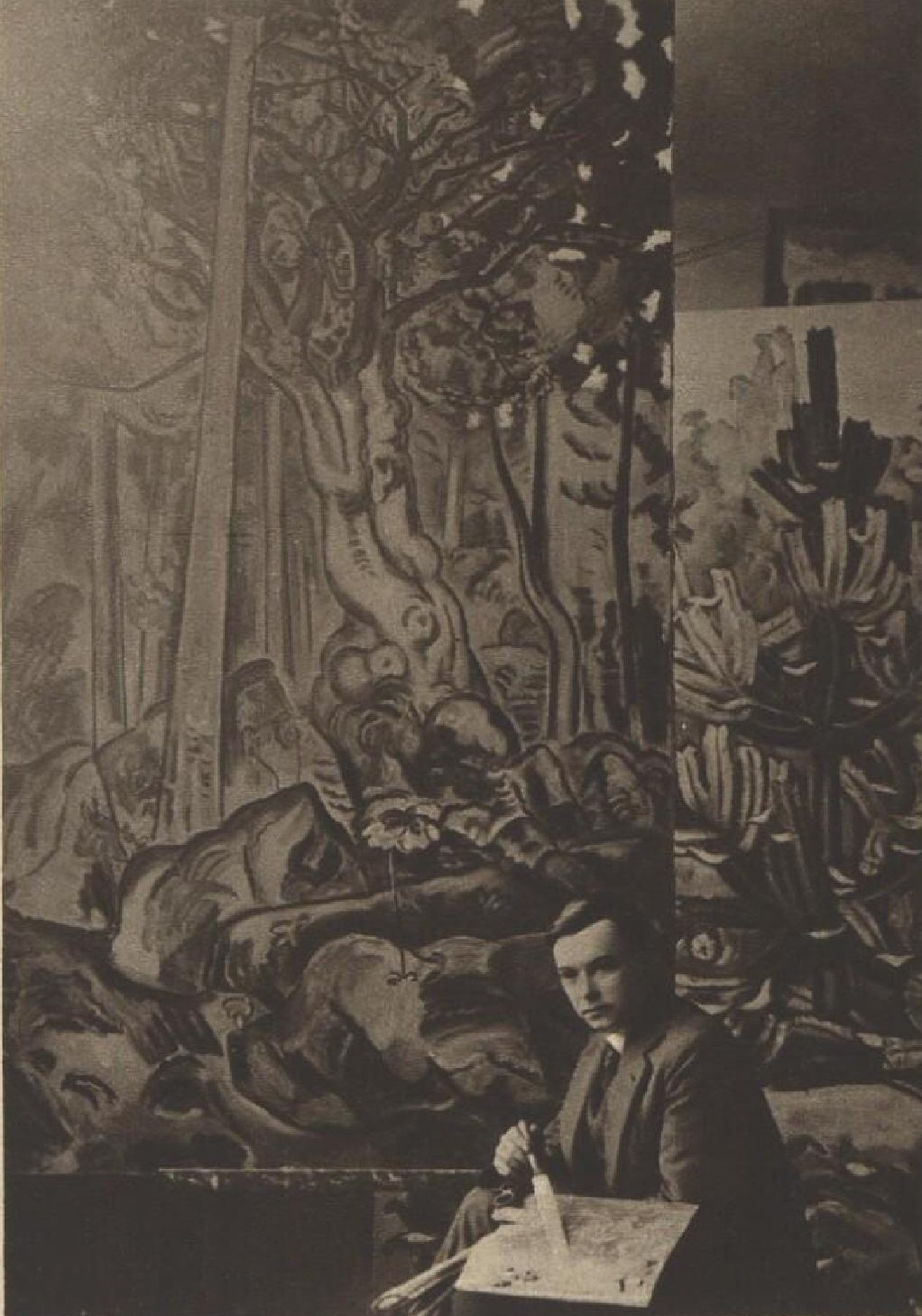 Josef Boháč – Heřmanský (1893-1956), český malíř a středoškolský profesor